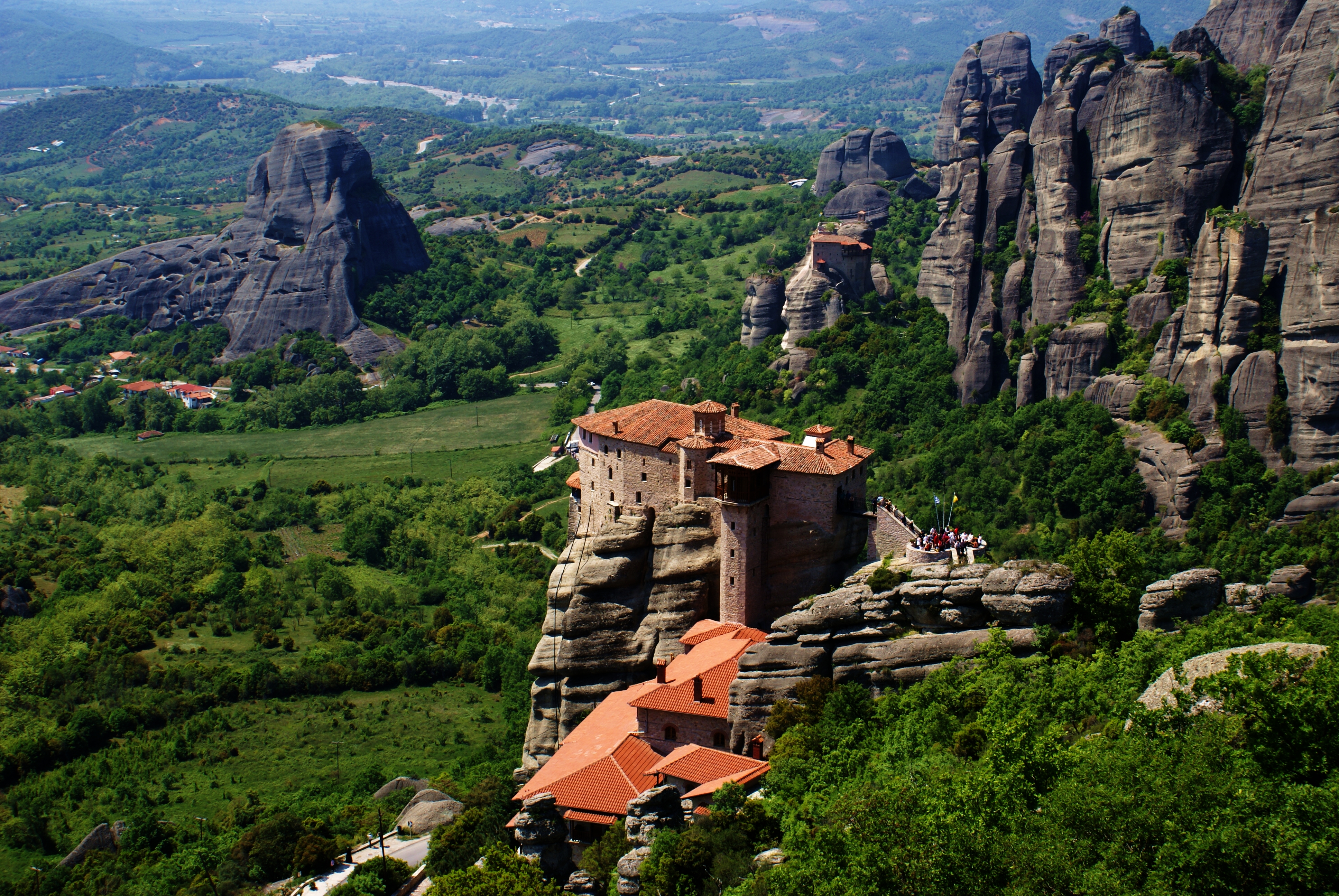 Μονή Ρουσάνου Μετεώρων«Μονή Ρουσάνου Μετεώρων»